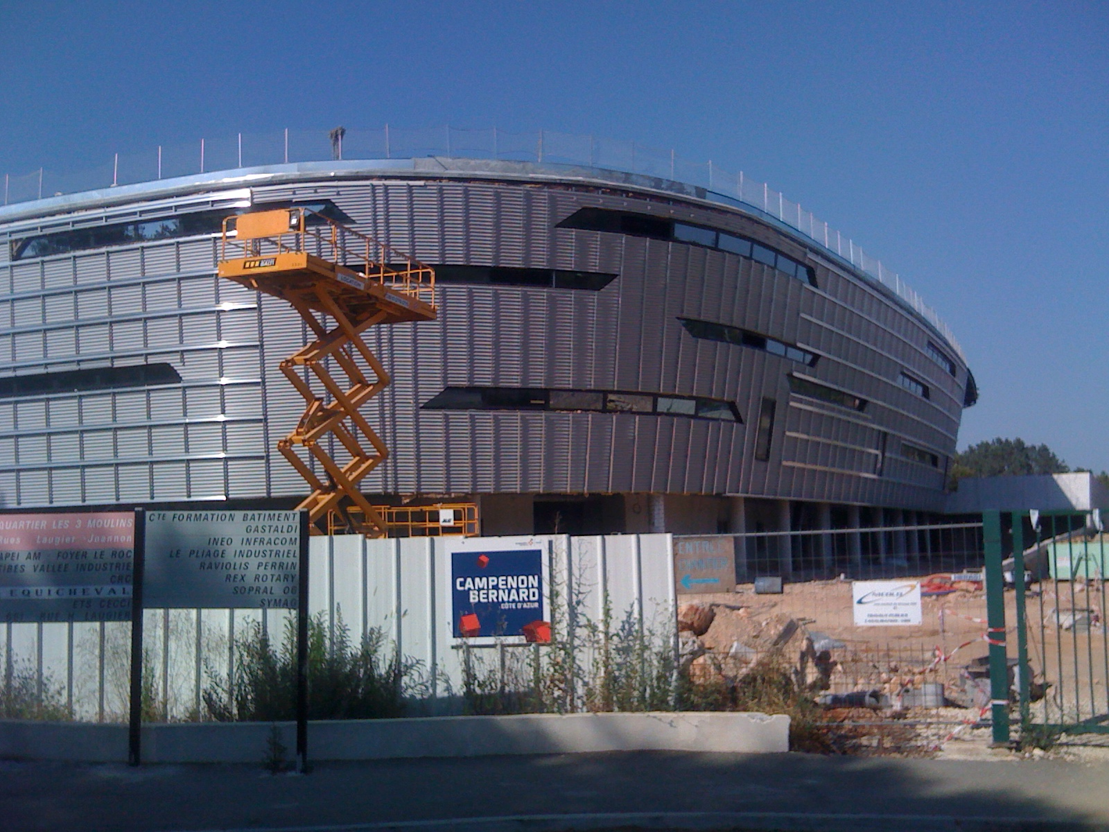 infrastructure